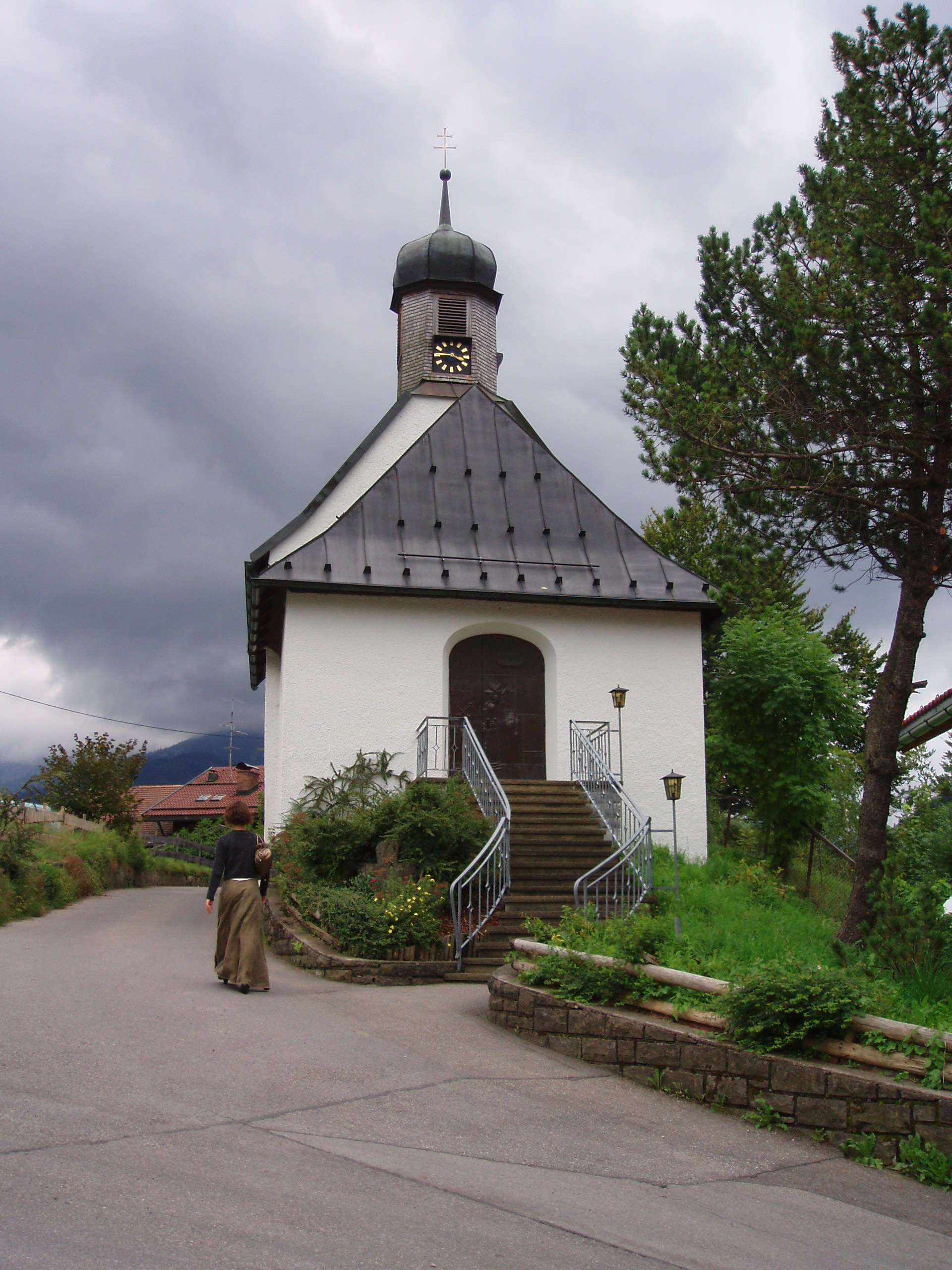 Kapelle S. Thomas in Vorderhindelang